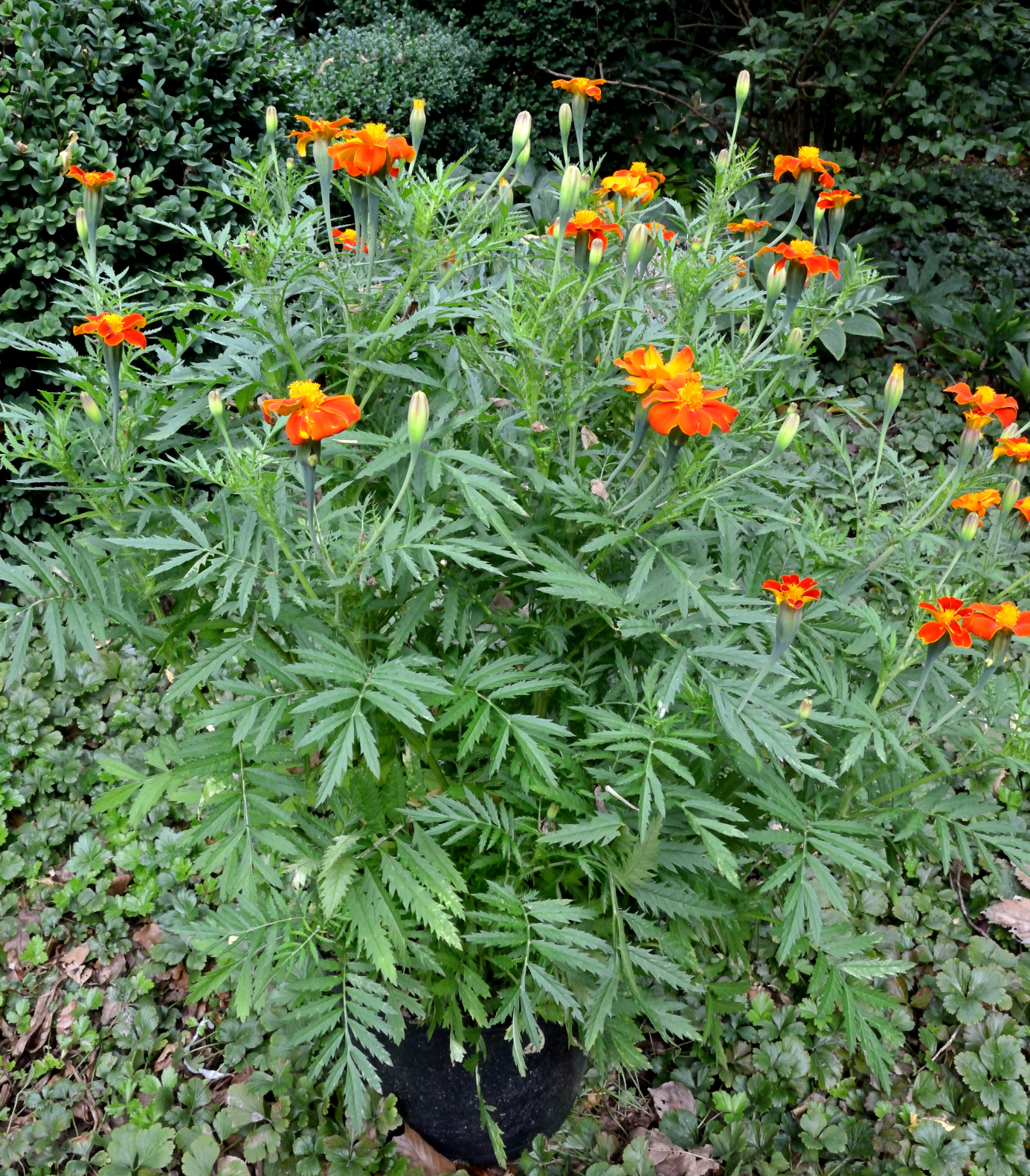 Tagetes patula uitgeplant, gezaaid 1 april 2015